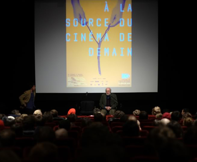 Présentation spéciale 16 février 2010 14e du Festival Proje(c)t Y à Montréal, Québec